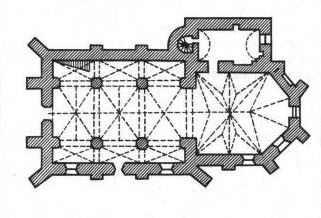 Ішкалдзь. План касцёла